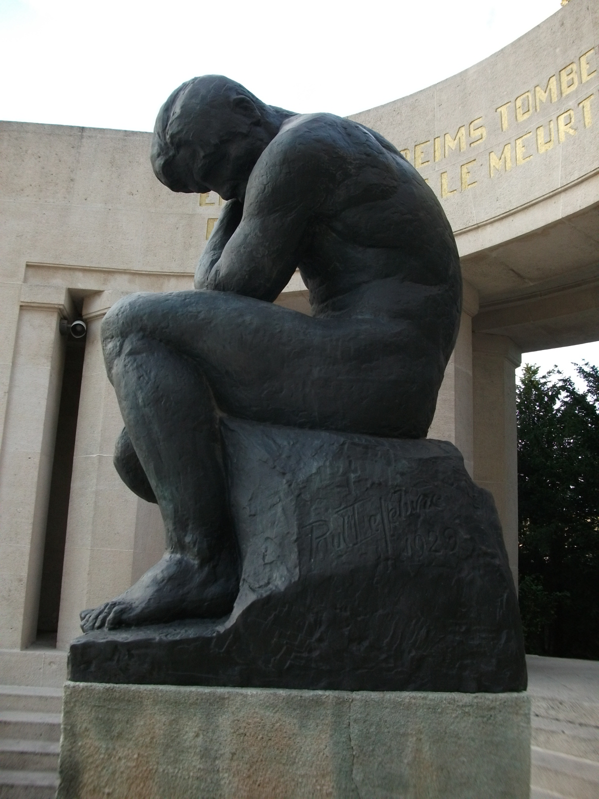 Monument_aux_morts_à Reims, sculpture de Paul Lefebvre de 1929. La statue se trouve place de la République de Reims.